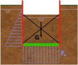 De wet van Archimedes bij horizontale grondinjectie